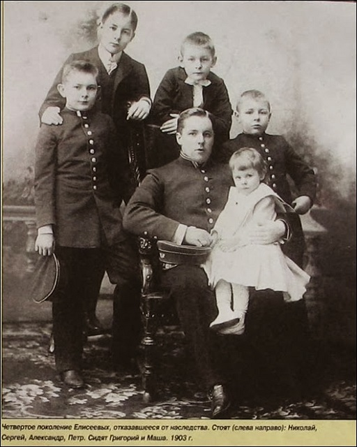 Елисеев Григорий Григорьевич с детьми (Стоят слева направо: Николай, Сергей Александр, Пётр, Сидят:Григорий Григорьевич с Машей на коленях)